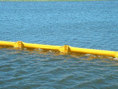 Ölsperre, Typ HT 600 Foto: Kai Breker